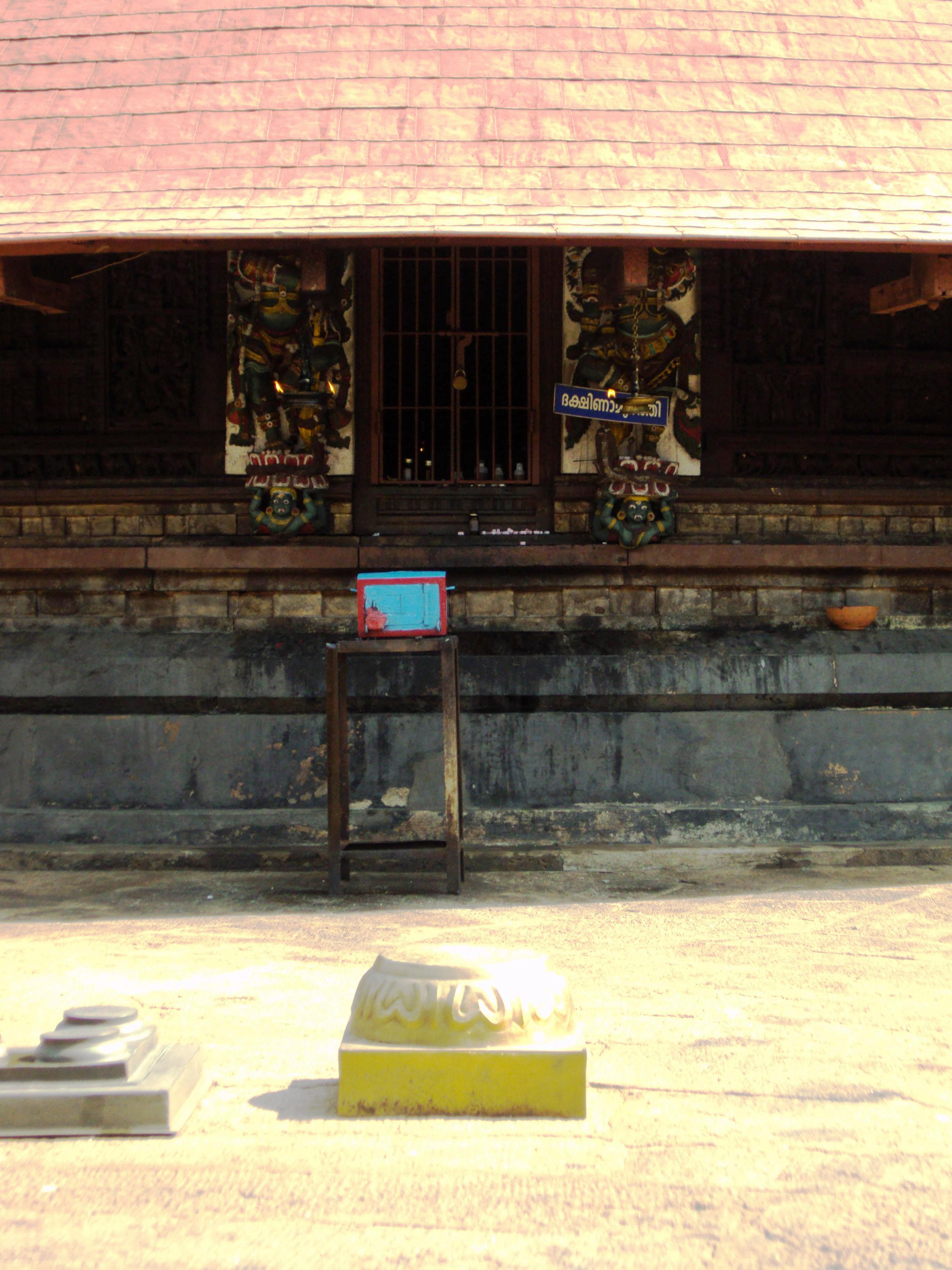 ദക്ഷിണാമൂർത്തി നട; വാഴപ്പള്ളി